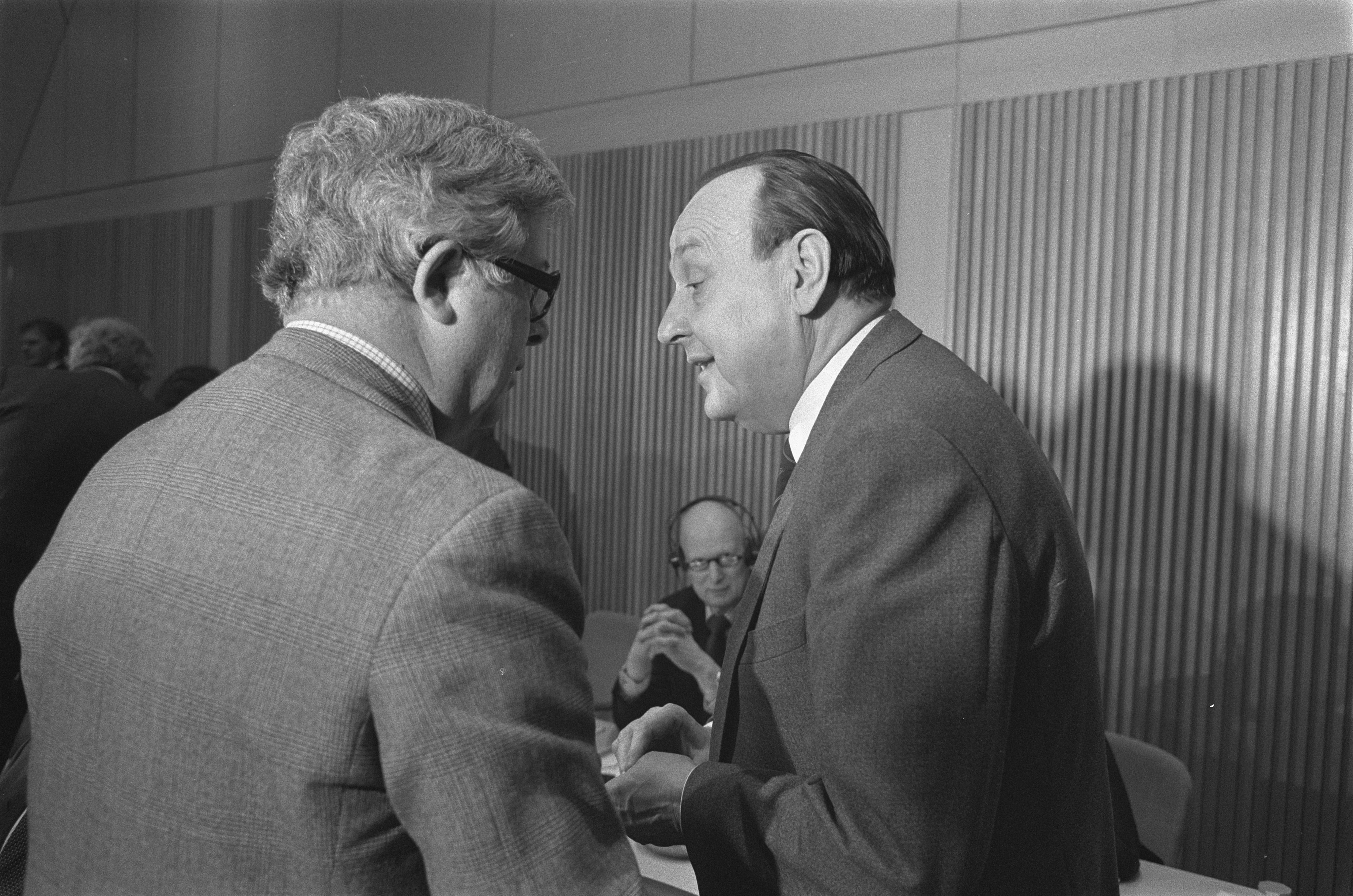 Collectie / Archief : Fotocollectie Anefo Reportage / Serie : Bijeenkomst van de EG ministers van Buitenlandse Zaken in Den Haag voor spoedoverleg ivm de vergeldingsbombardementen van de VS op Libie Beschrijving : De Duitse minister Genscher (l) in gesprek met de Engelse minister Howe Datum : 14 april 1986 Locatie : Den Haag, Zuid-Holland Trefwoorden : ministers, vergaderingen Persoonsnaam : Genscher, Hans-Dietrich, Howe, Geoffrey Instellingsnaam : EEG Fotograaf : Fotograaf Onbekend / Anefo Auteursrechthebbende : Nationaal Archief Materiaalsoort : Negatief (zwart/wit) Nummer archiefinventaris : bekijk toegang 2.24.01.05 Bestanddeelnummer : 933-6243